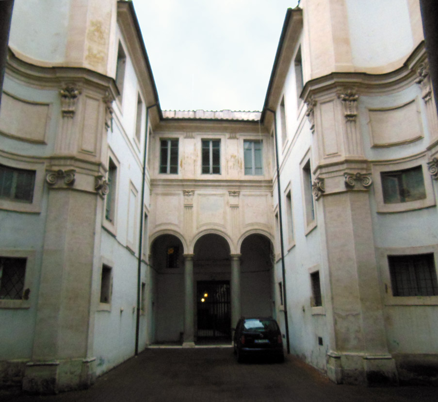 Roma, chiesa di Santa Maria della Concezione in Campo Marzio, cortile e facciata della chiesa